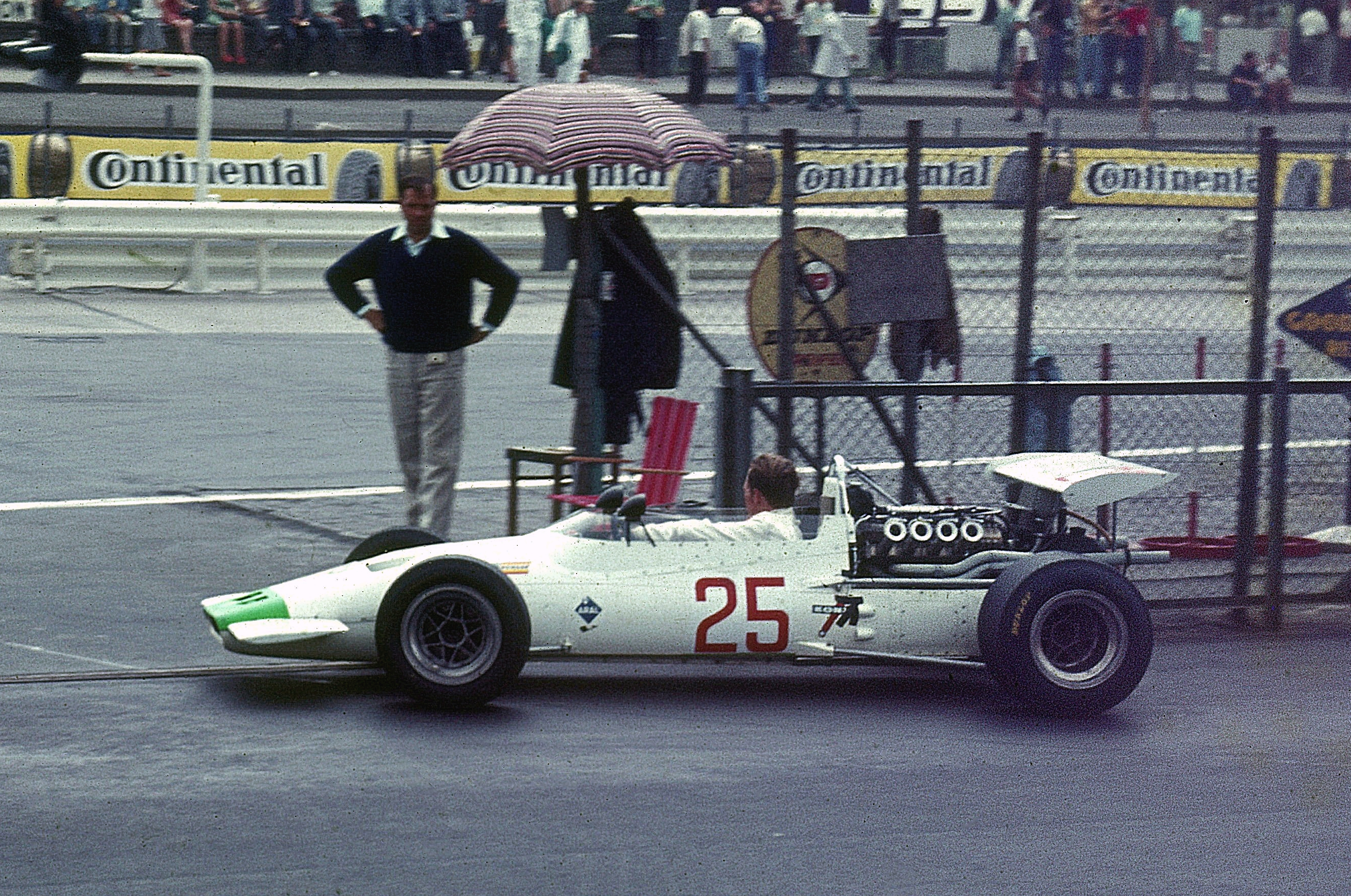 Dieter Quester im BMW F269 am 1. August 1969 nach dem Vormittagstraining zum Großen Preis von Deutschland auf dem Nürburgring